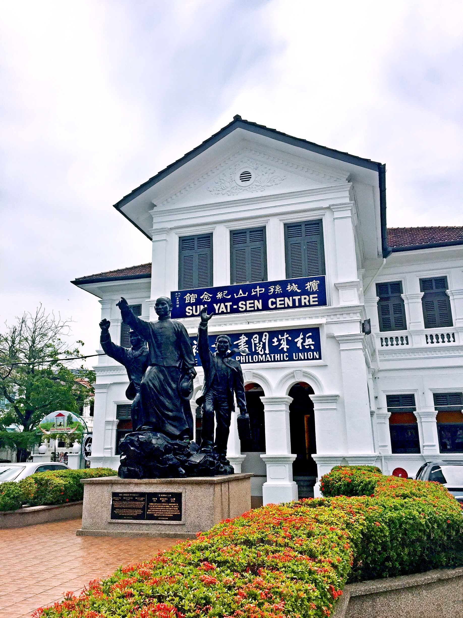 槟城孙中山纪念馆正门